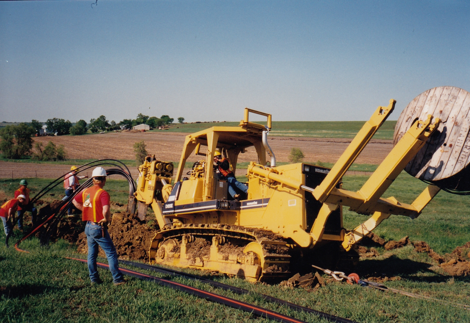 Ein Vibrationspflug beim Verlegen von verschiedenen Leerrohren.